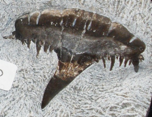 Fossil of Symmorium, an extinct fish - Took the photo at Fossil Show, Munchen 2011